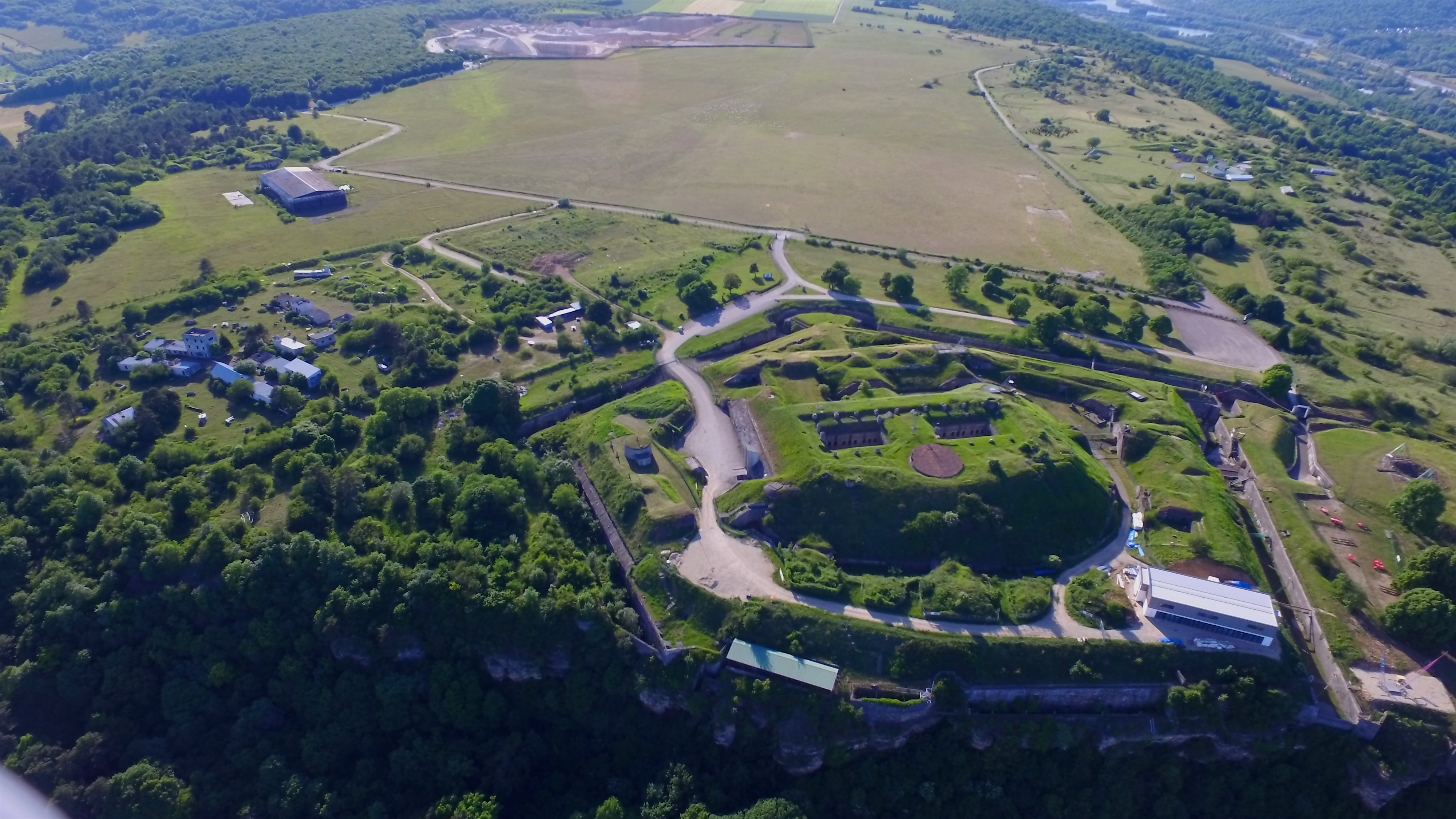 Le Fort Pélissier vu du ciel